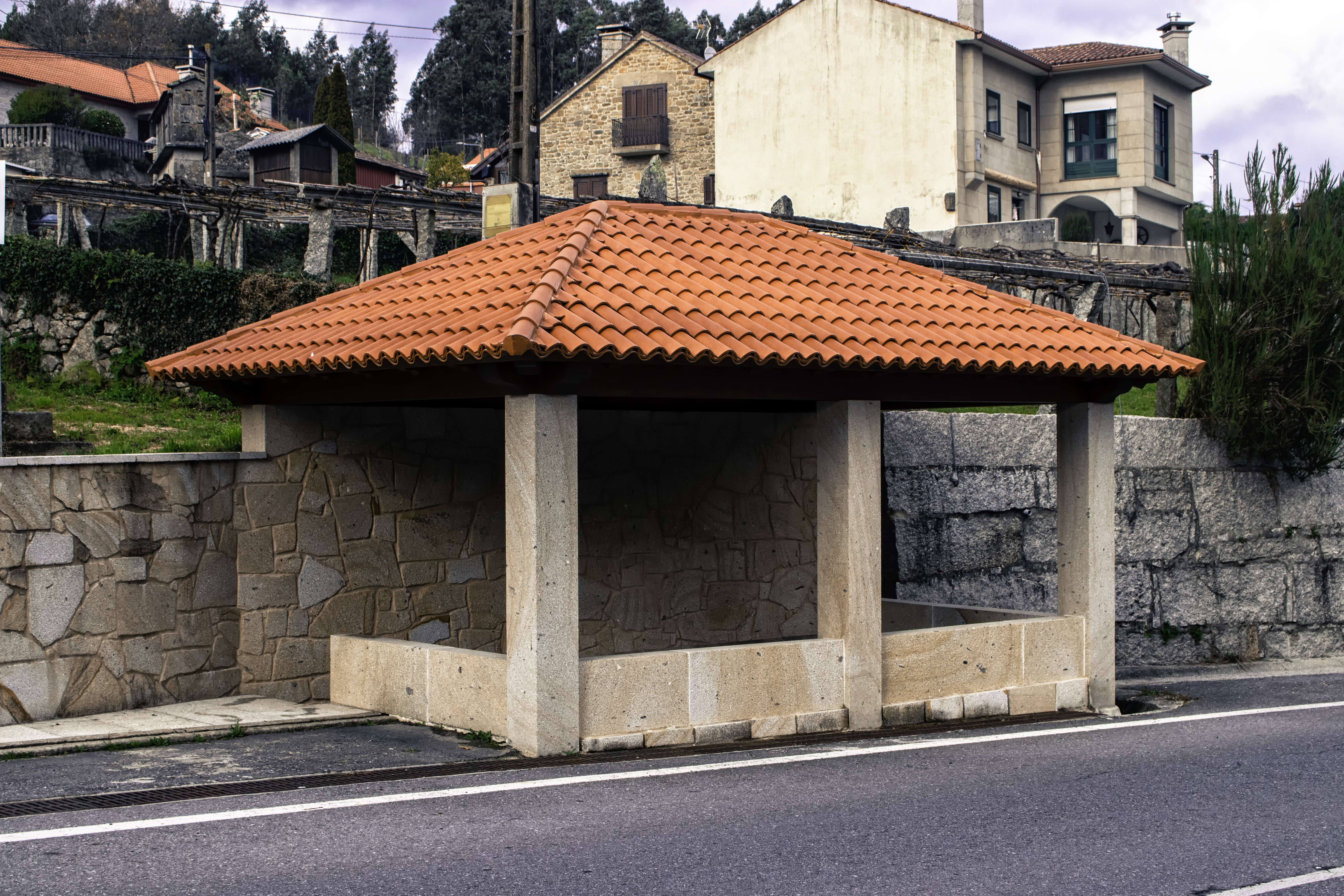 Lavadoiro de Paraños, Moraña.